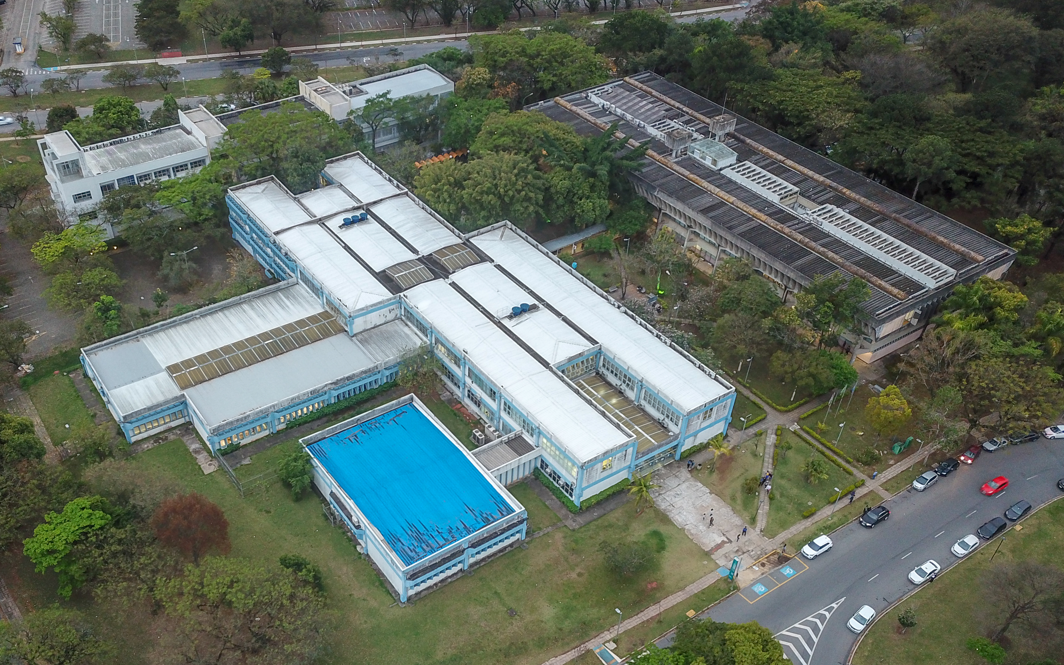 Vista aérea IME-USP